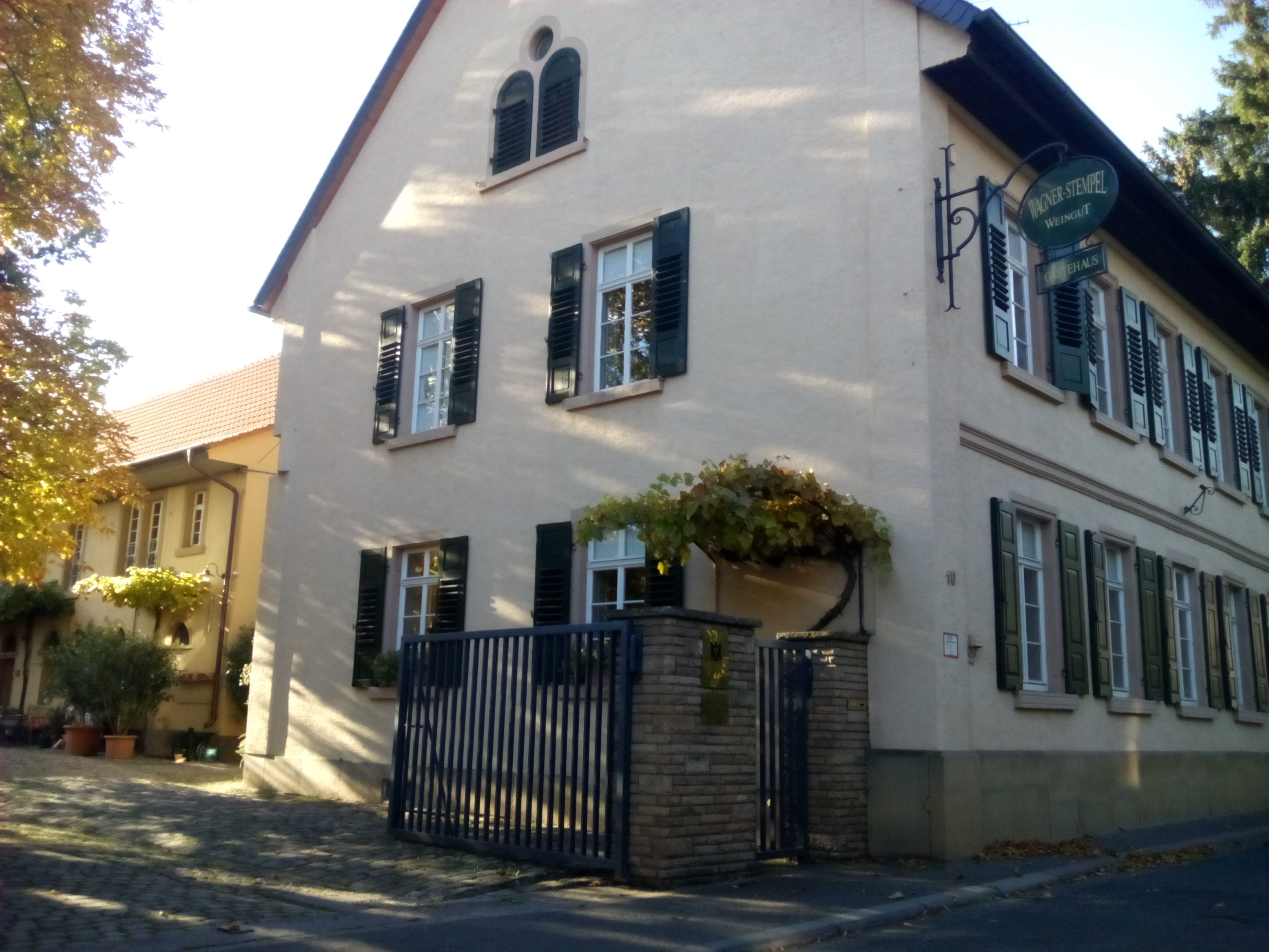 Ansicht von der Straße aus